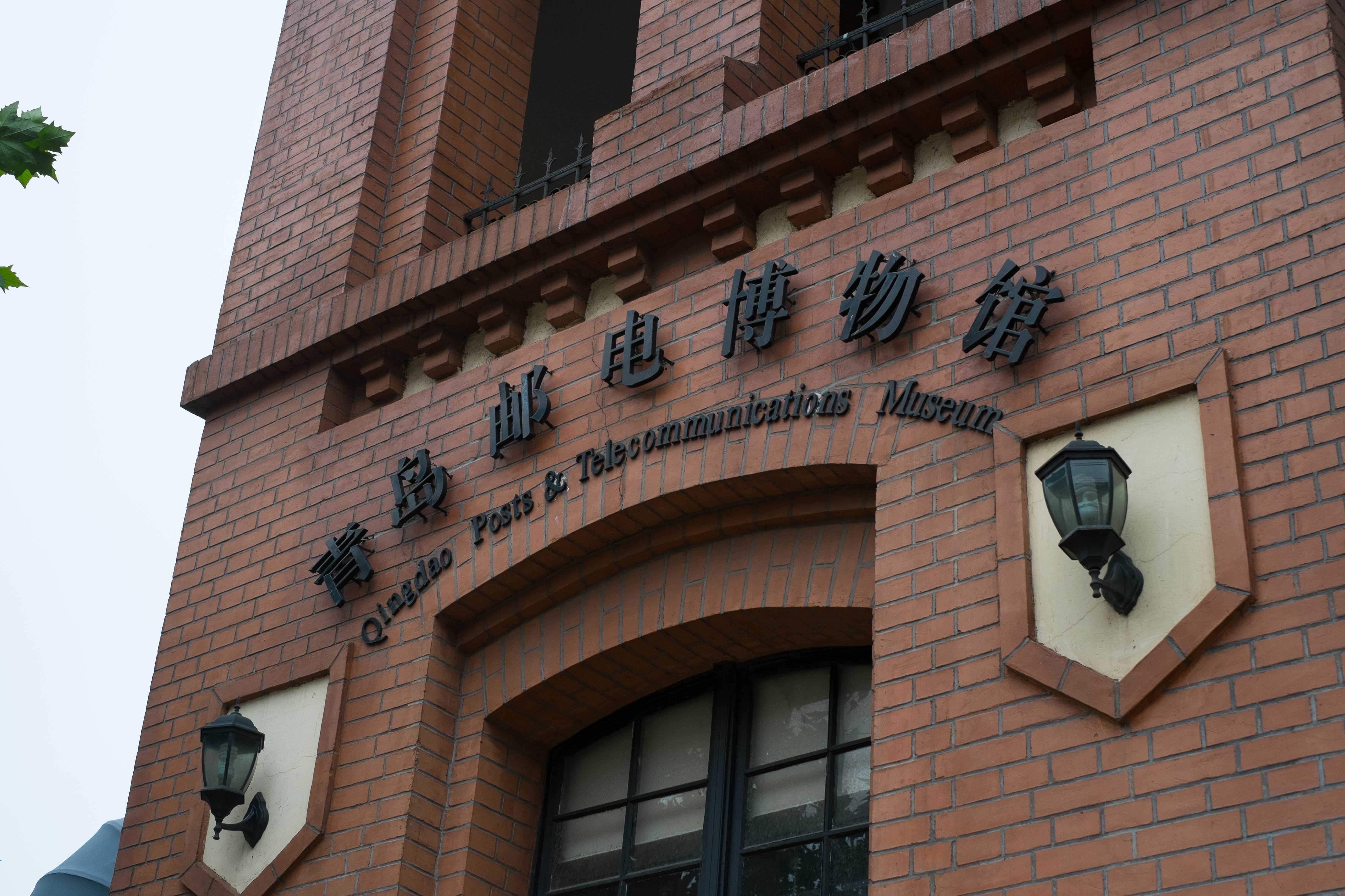 青岛邮电博物馆正门门牌